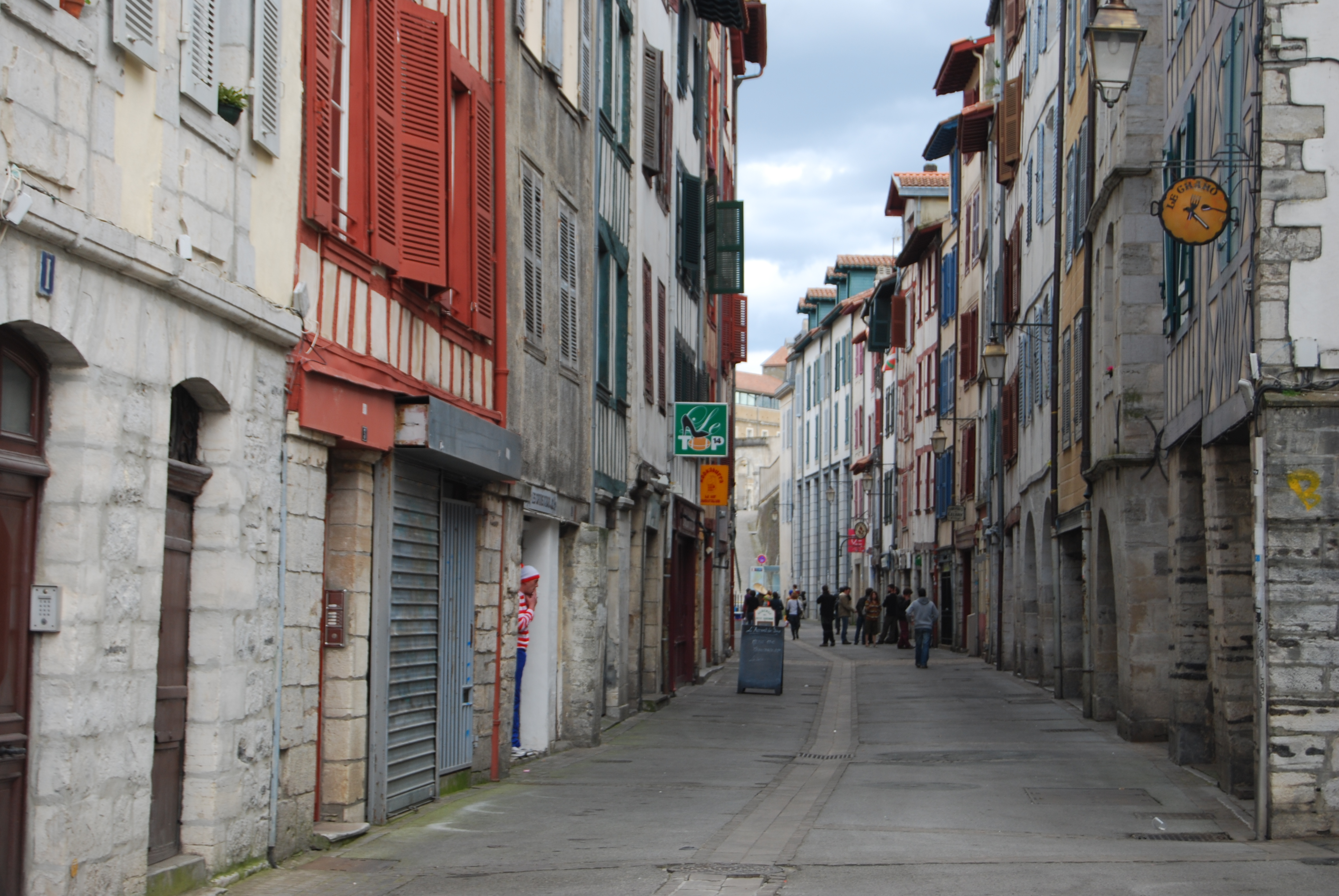 La rue des Cordeliers.